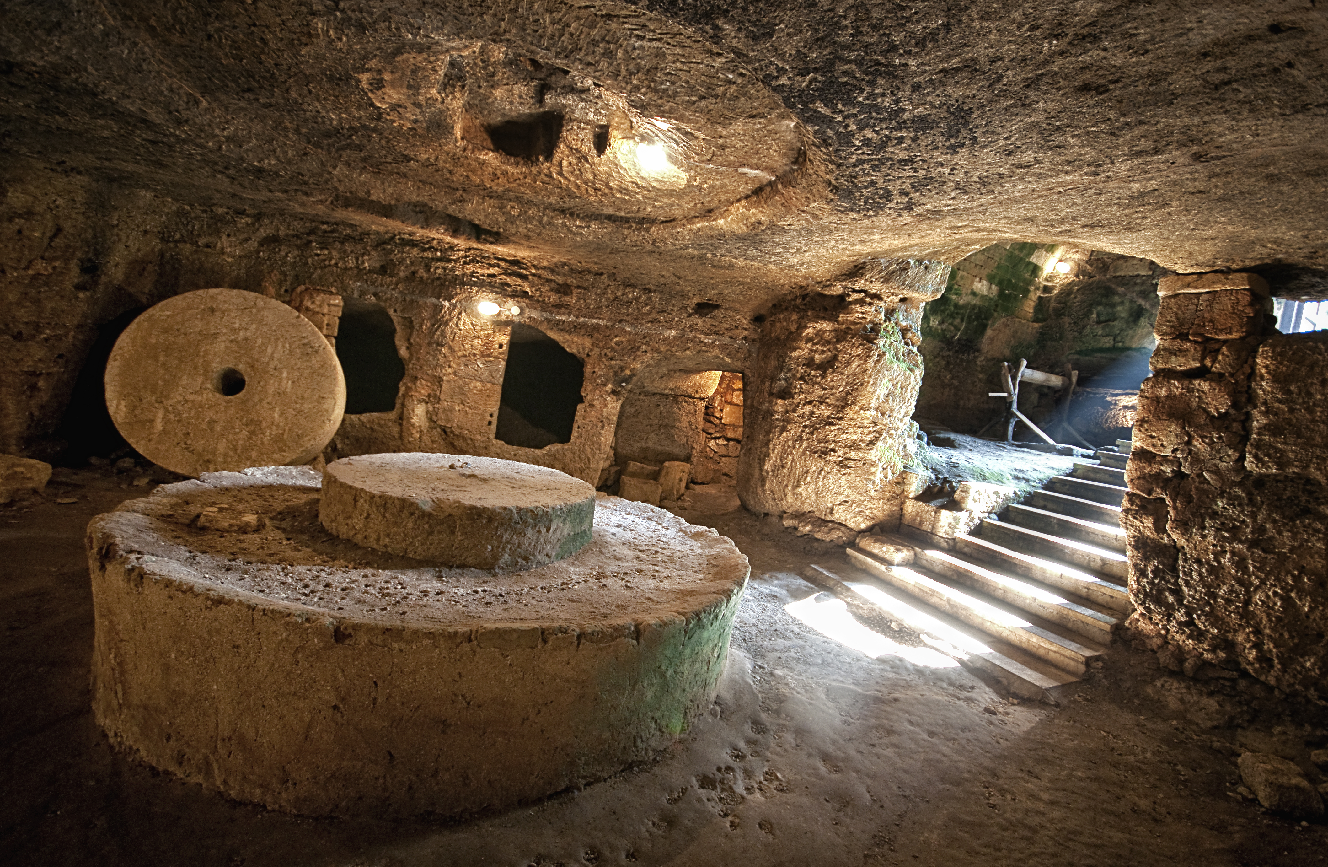 Frantoio ipogeo nell'Abbazia di Cerrate a Lecce in provincia di Lecce, Italia.